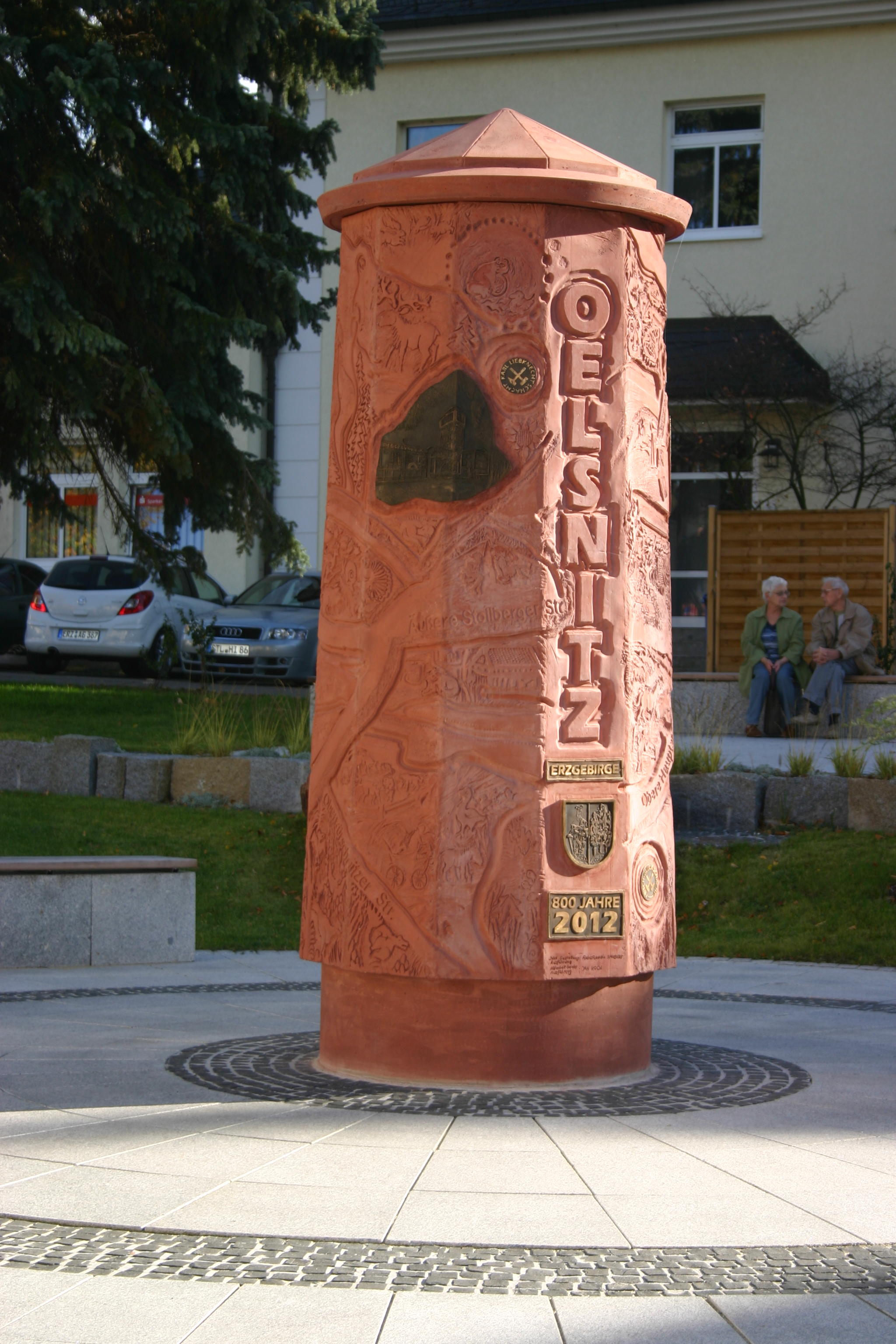 Stele zur Stadtgeschichte Oelsnitz/Erzgeb.